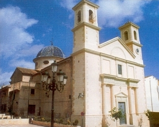 Iglesia de la Transfiguración del Señor